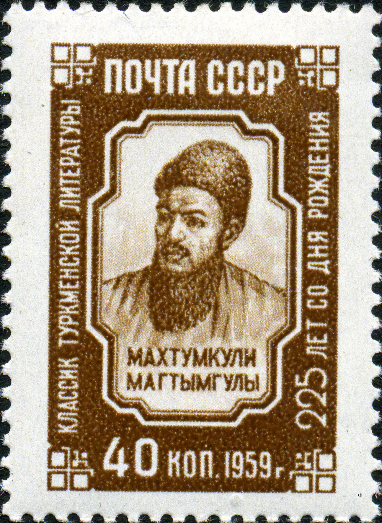 Марка СССР